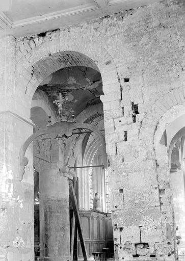 Nef, vue vers le nord-ouest dans la base du clocher.